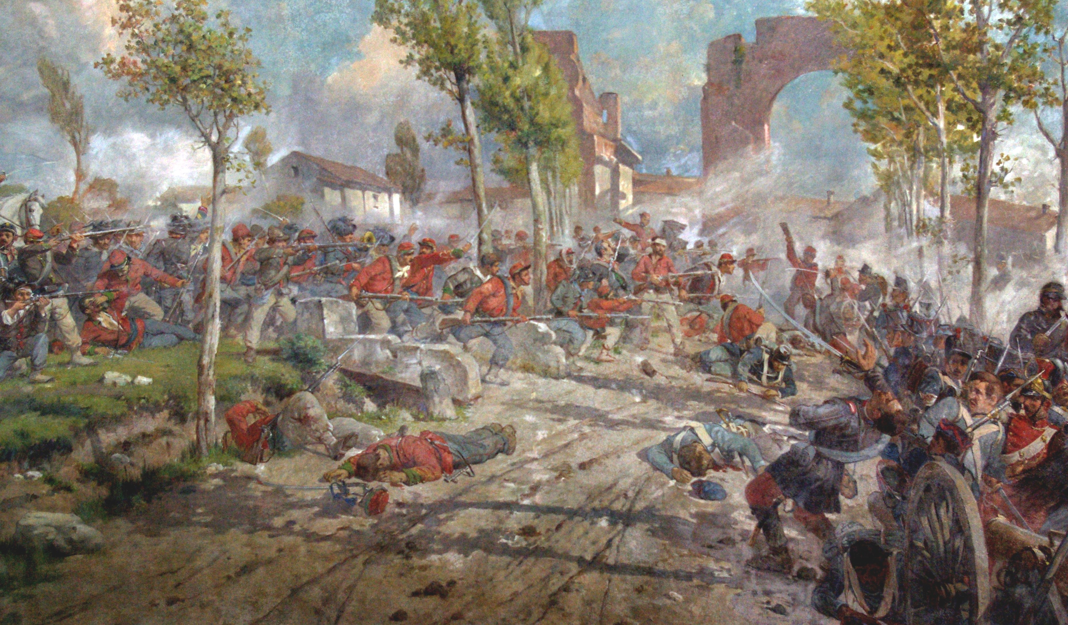 Ausschnitt eines Freskos im Turm von San Martino della Battaglia